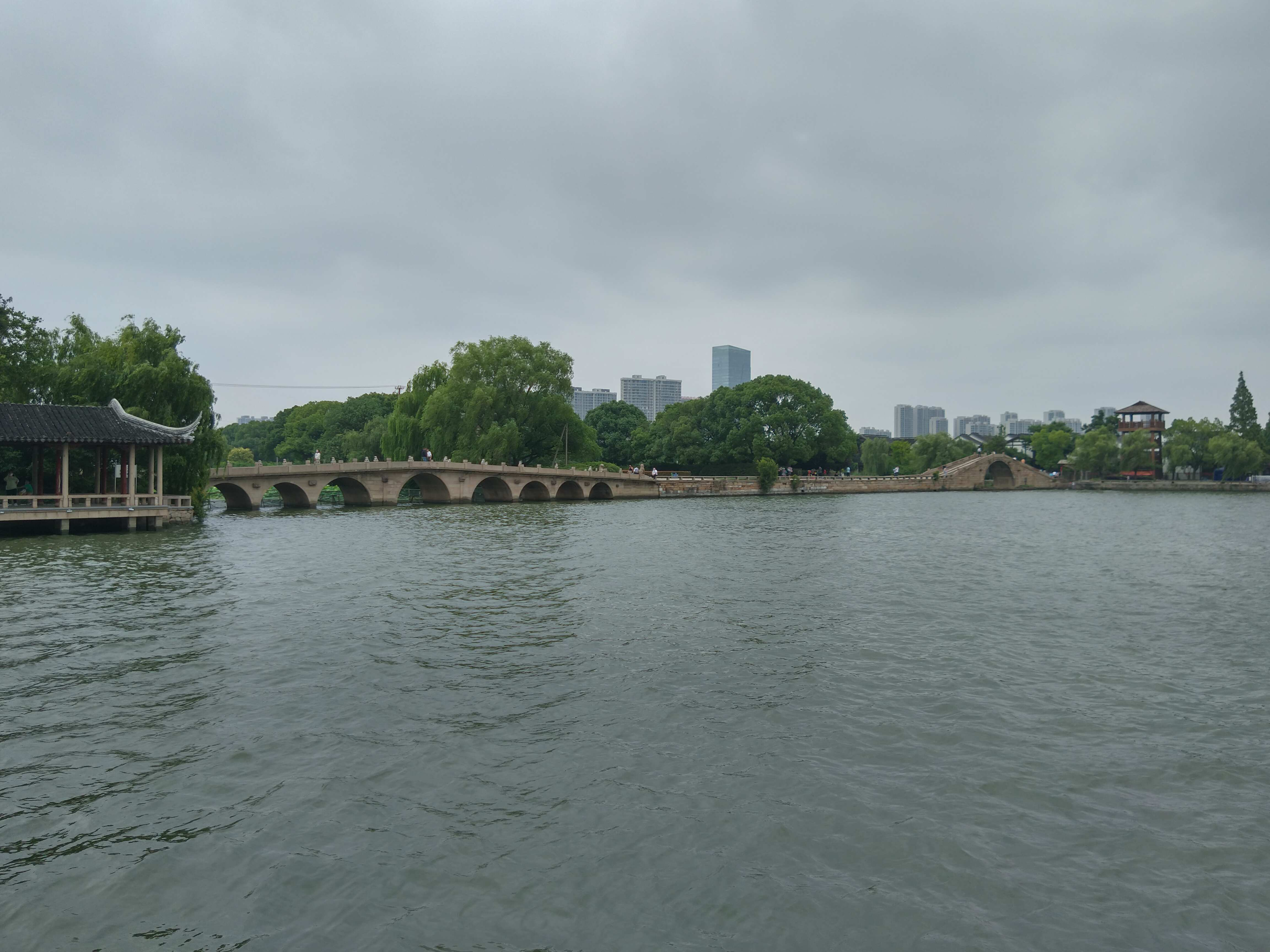 行春桥（左）与越城桥（右）